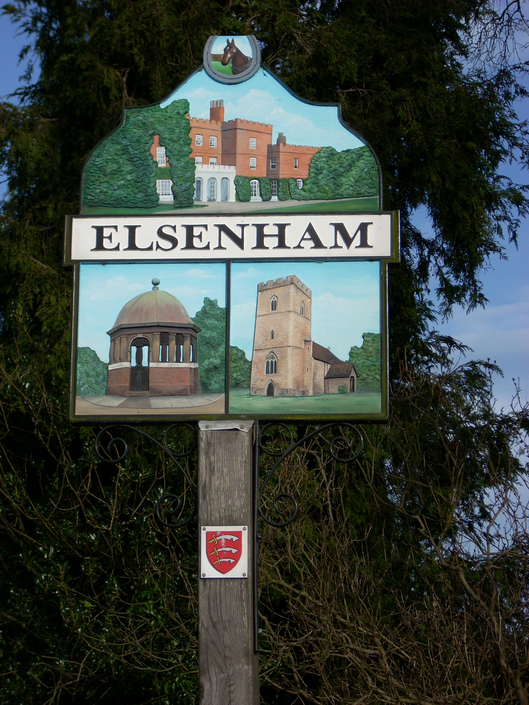 Village sign of Elsenham, Essex, England